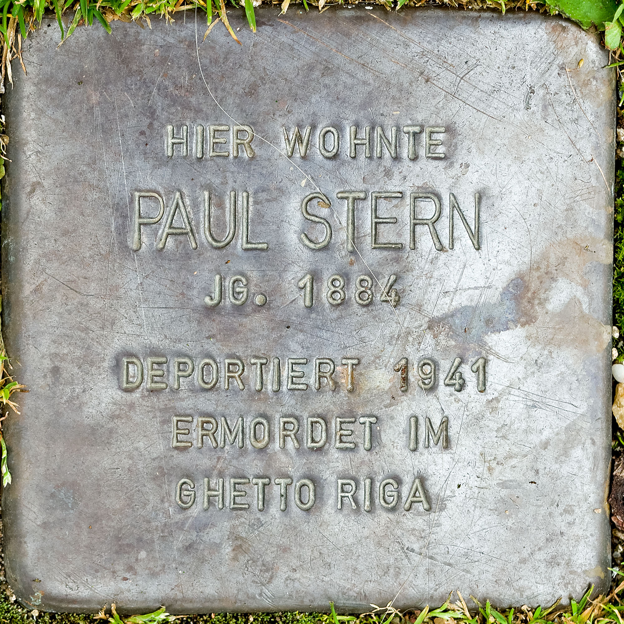 Stolpersteine in Viersen: Stern, Paul